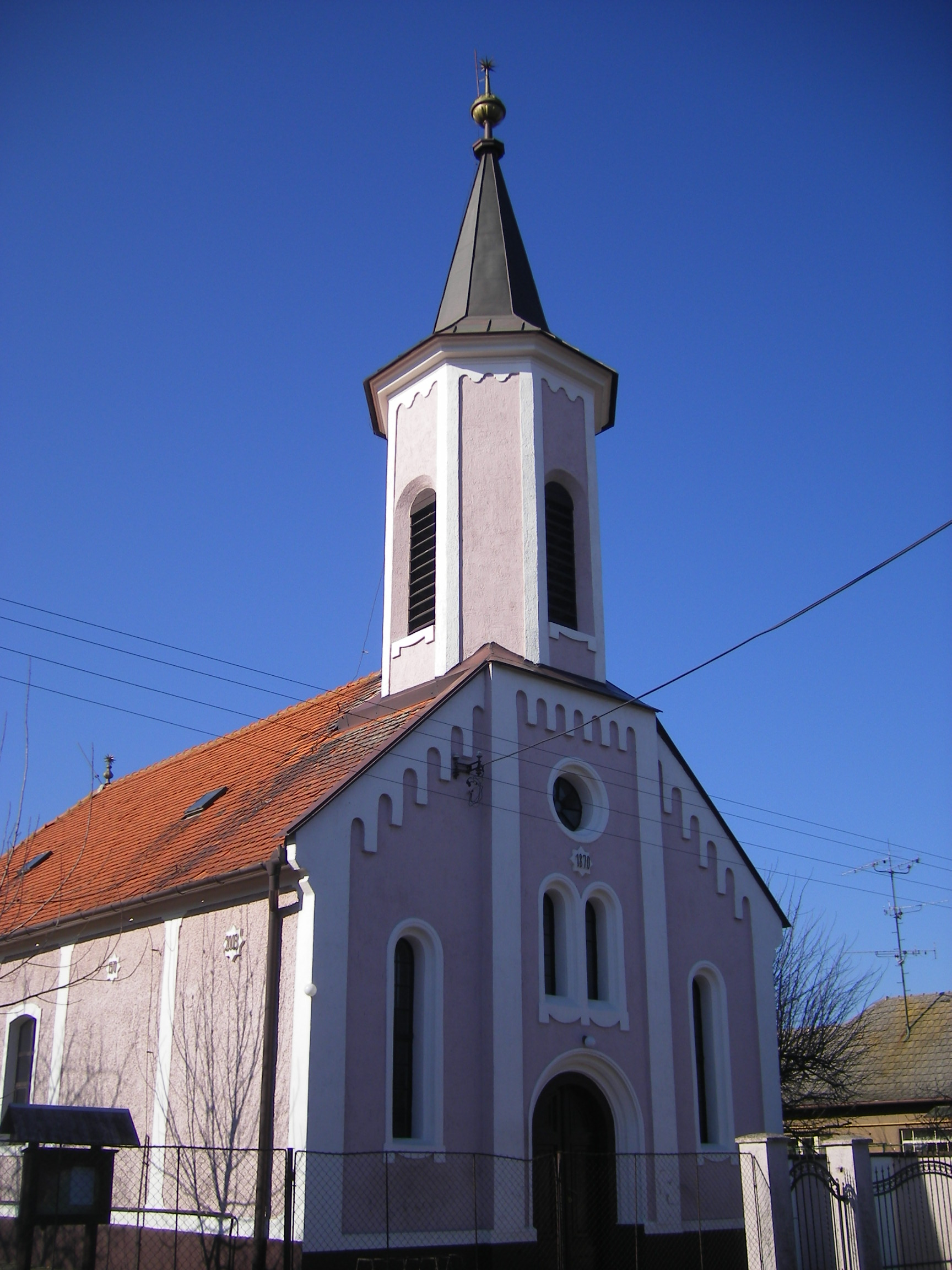 Megyercs - református templom